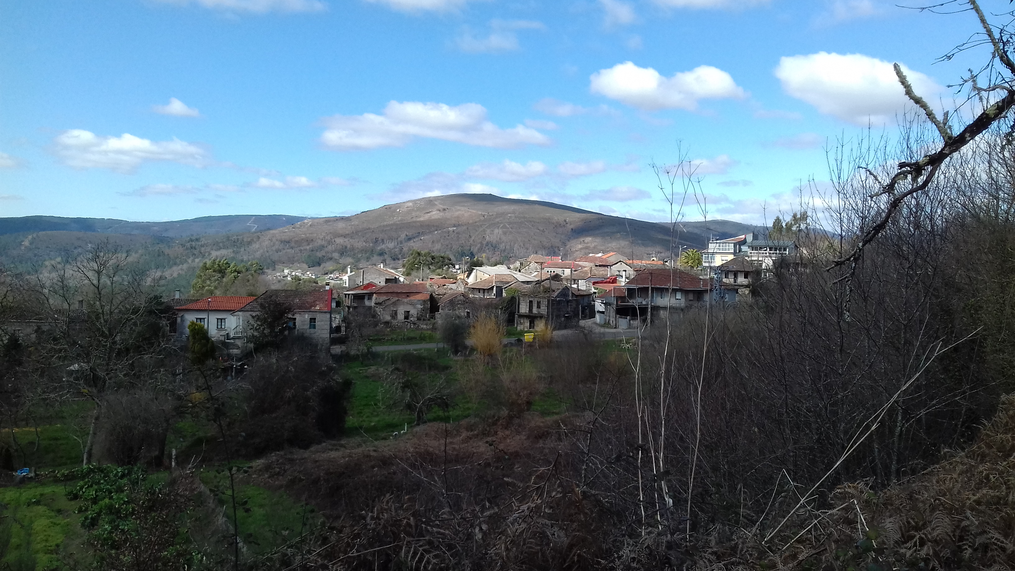 Penedo de Xuvencos, Boborás